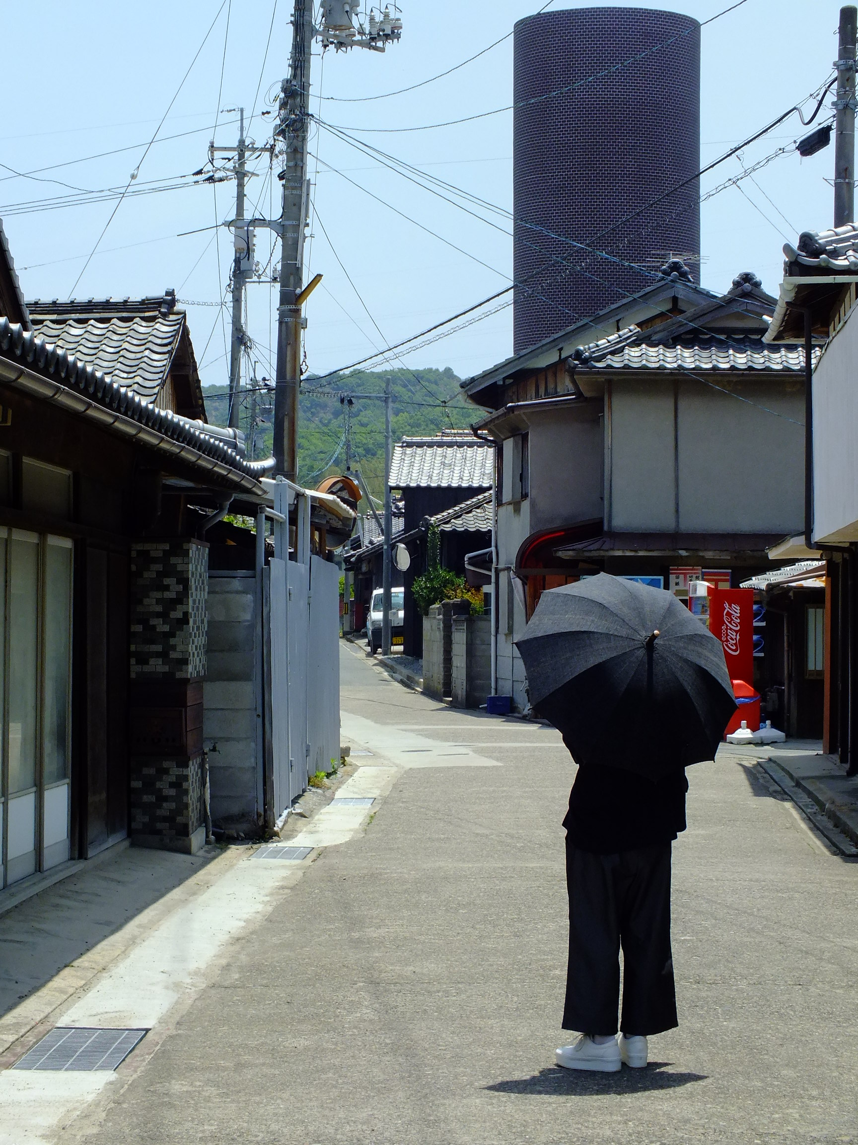 TEL: 0879-68-3555 （豊島美術館）